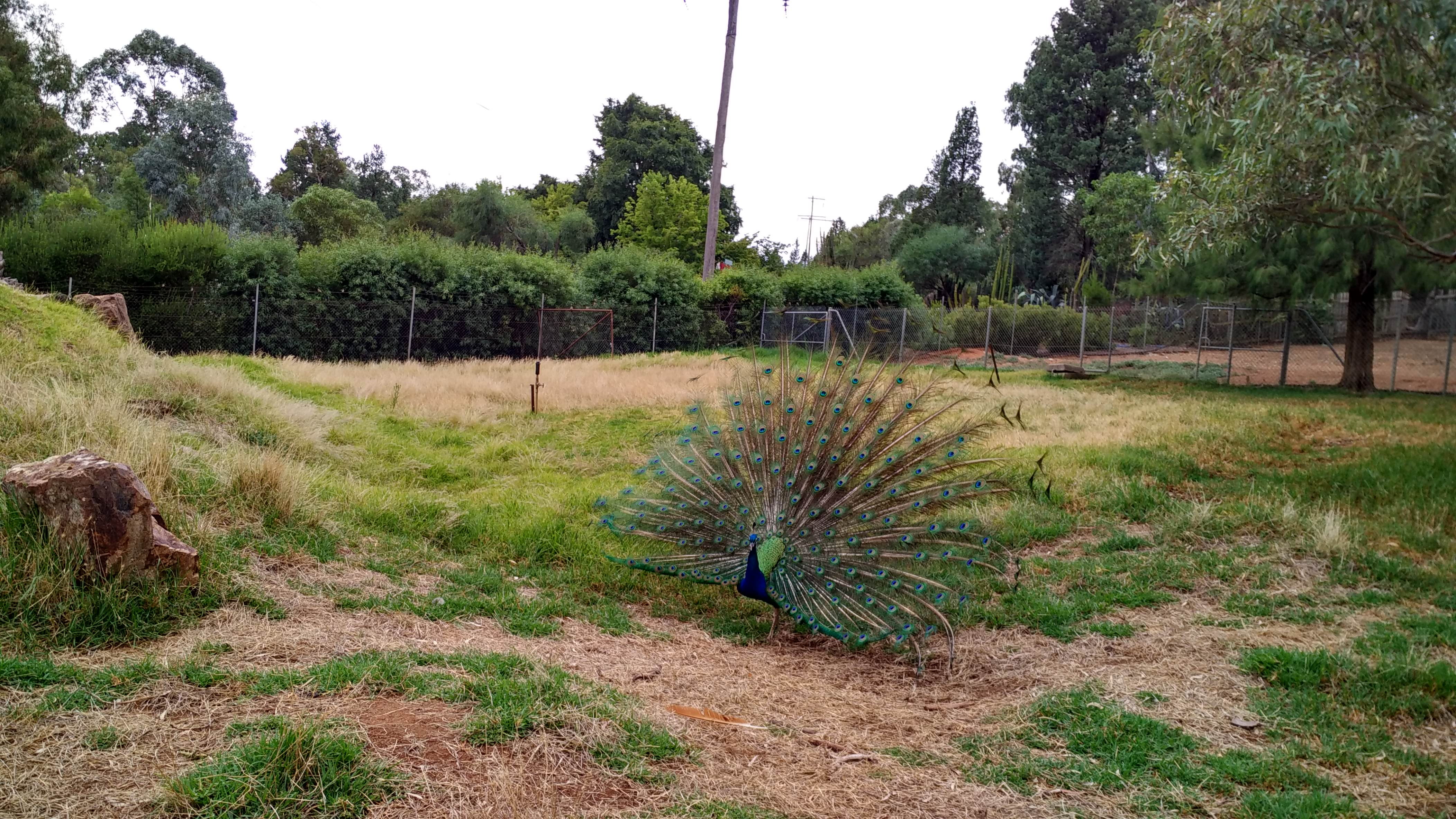 Merak di kebun binatang Wagga Wagga